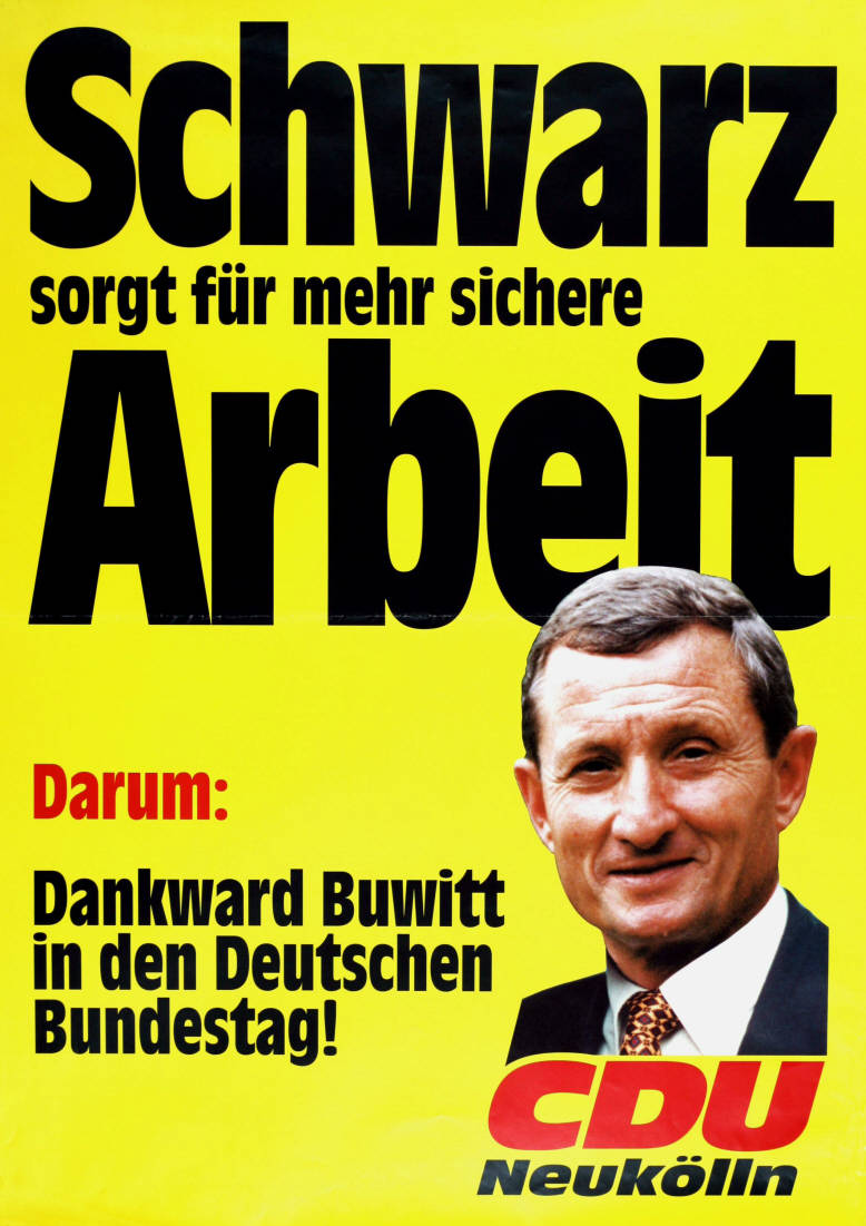 Schwarz sorgt für mehr sichere Arbeit Darum: Dankward Buwitt in den Deutschen Bundestag! CDU NeuköllnAbbildung:PorträtfotoKommentar:Datierung unsicherPlakatart:Kandidaten/Personenplakat mit Objekt-Signatur:10-001: 5058Bestand:Plakate zu Bundestagswahlen (10-001)GliederungBestand10-18:Plakate zu Bundestagswahlen (10-001) » Die 14. Bundestagswahl am 27. September 1998 » CDU » Mit PorträtfotoLizenz:KAS/ACDP 10-001: 5058 CC-BY-SA 3.0 DE